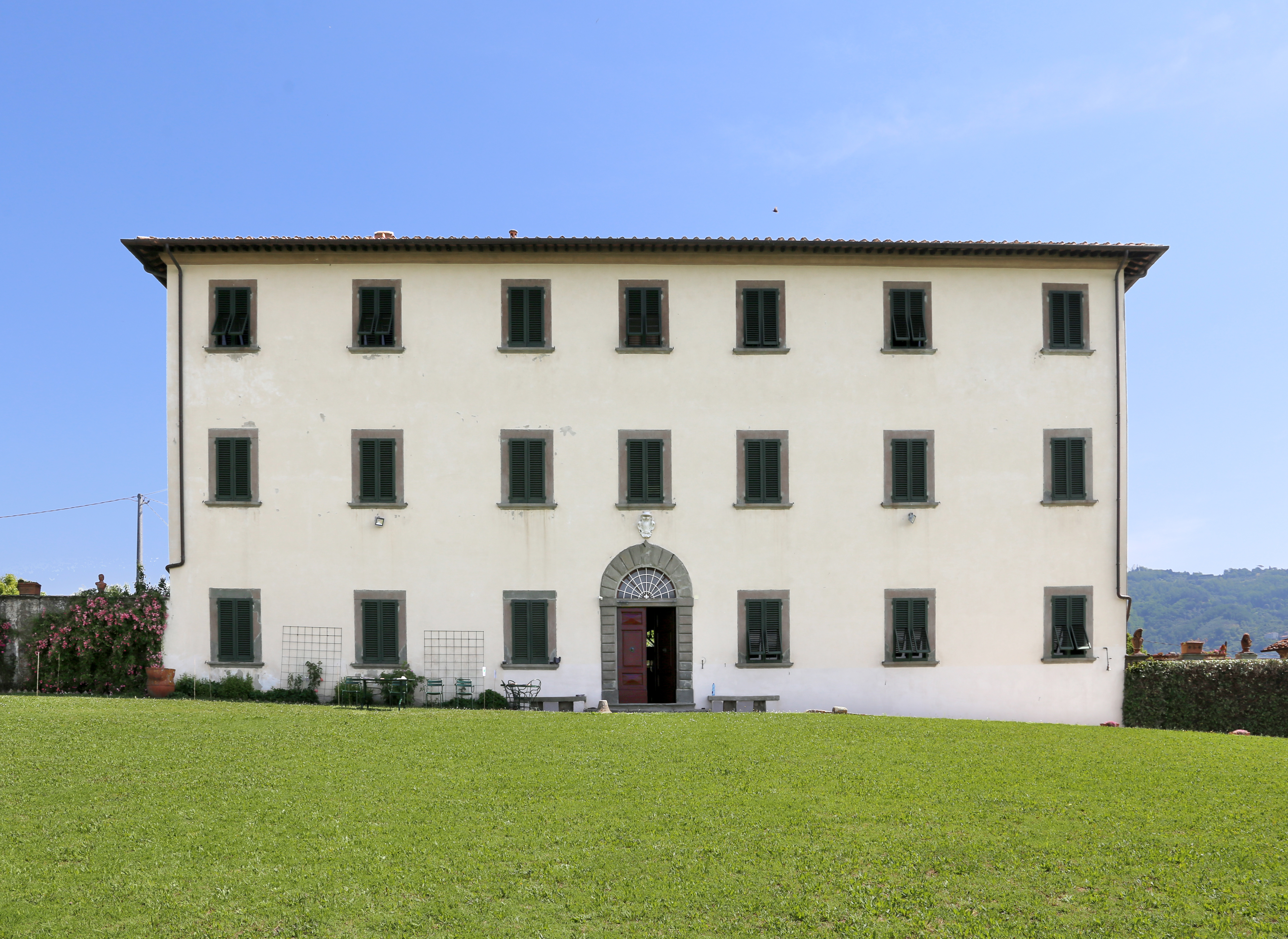 Villa La Guardatoia This is a photo of a monument which is part of cultural heritage of Italy.